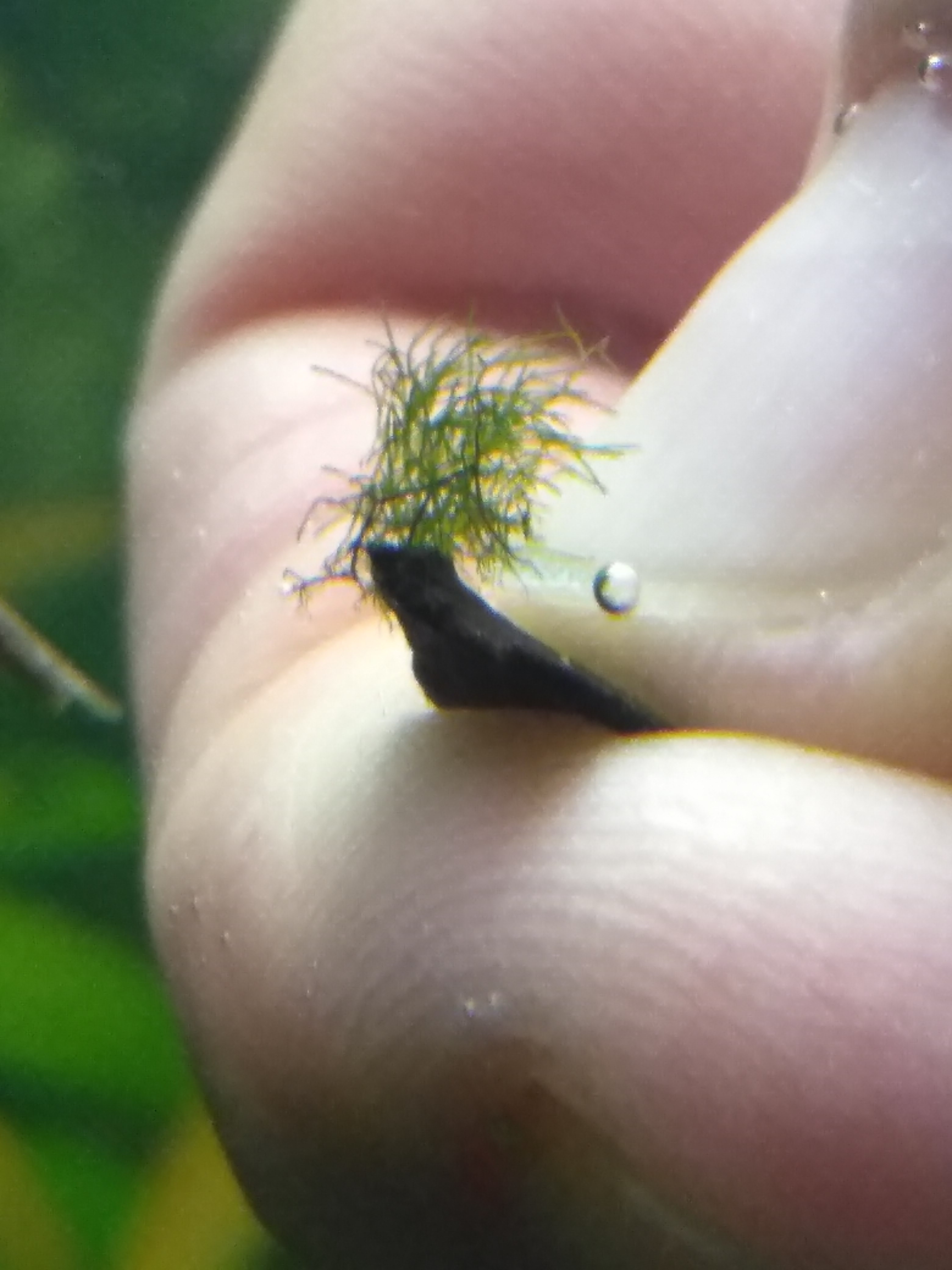 Водорость міцно кріпиться до камінця